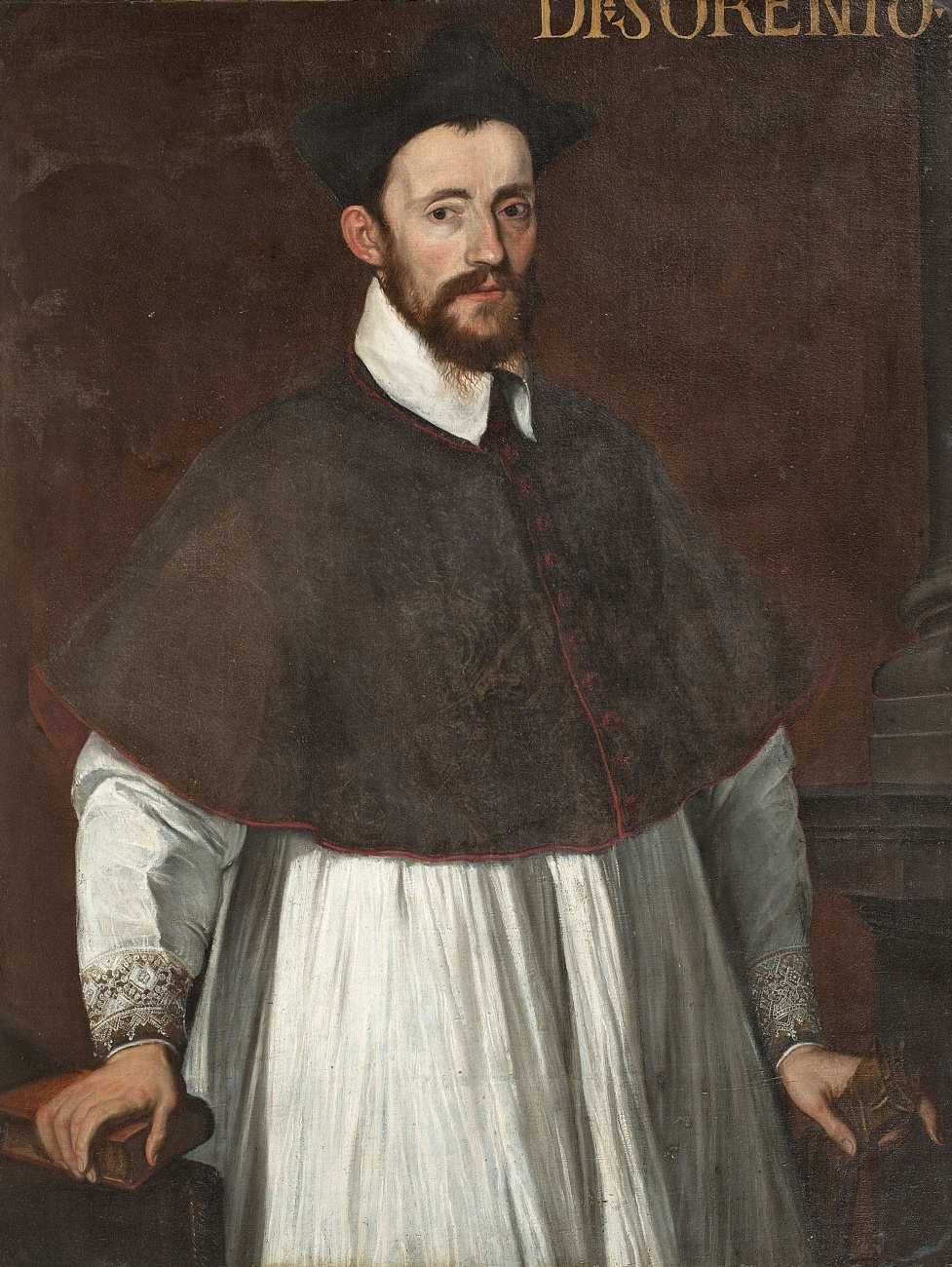 Bildnis eines Geistlichen. Italien, spätes 16. Jahrhundert.